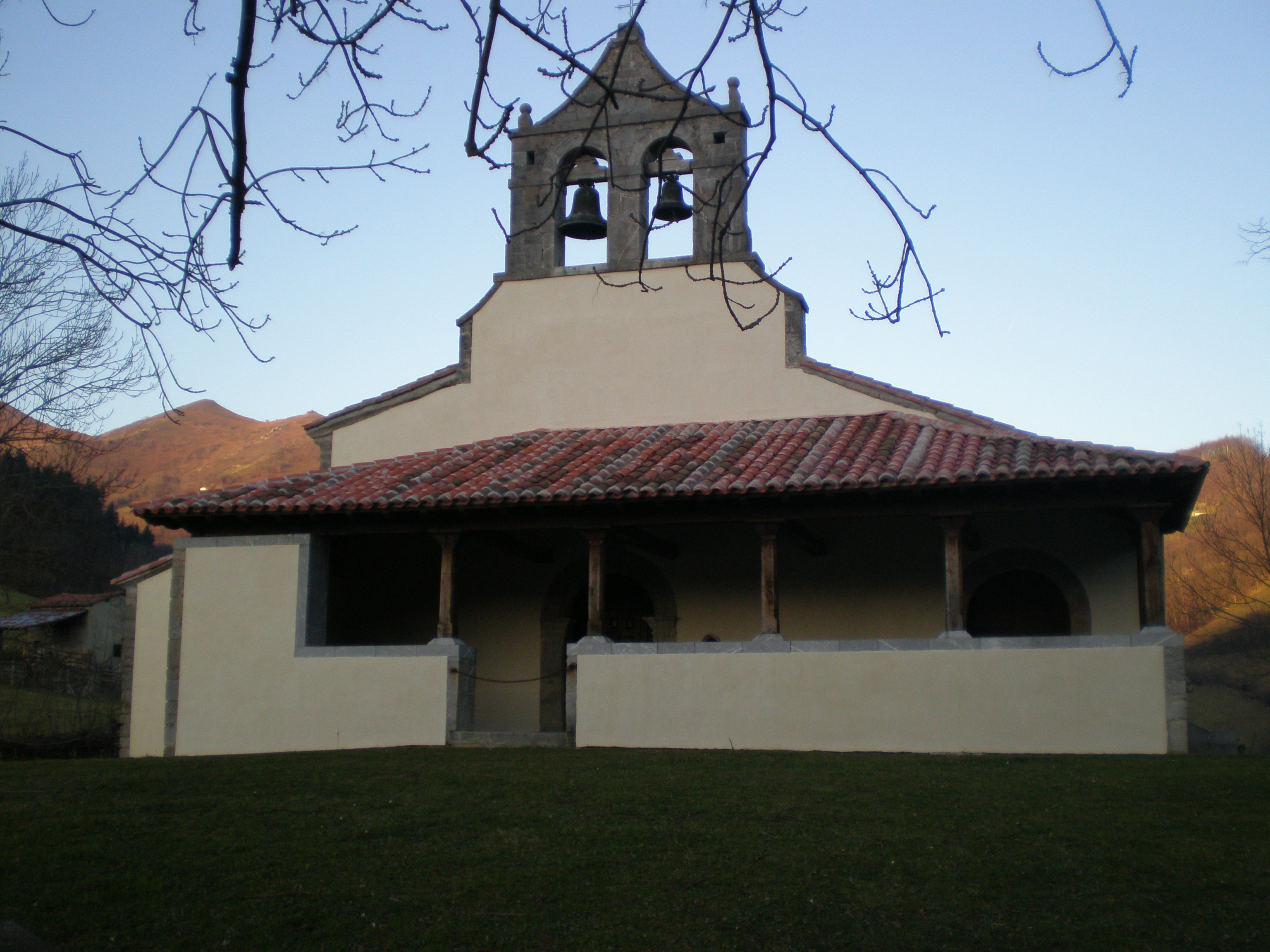 San Vicente de Serrapio